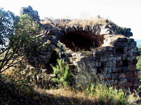 castell de Rosanes o Pairet a la comarca del Baix Llobregat - Catalunya